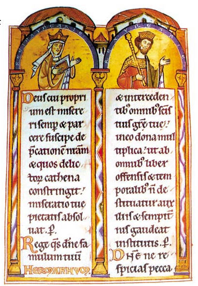 Gertuda Meránská a ondřej II.